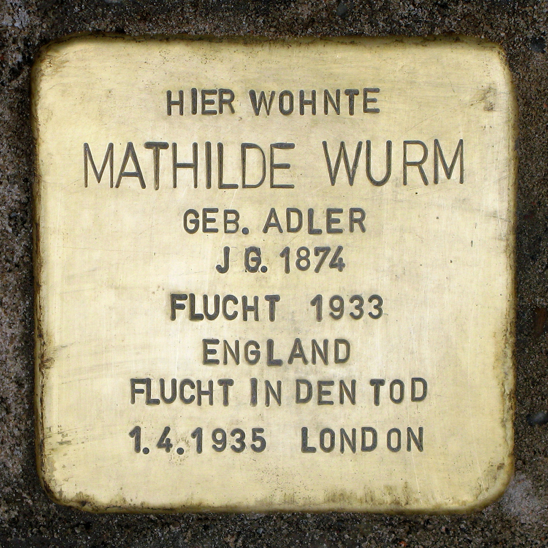 Stolperstein für Mathilde Wurm, Genthiner Straße 41, Berlin-Tiergarten